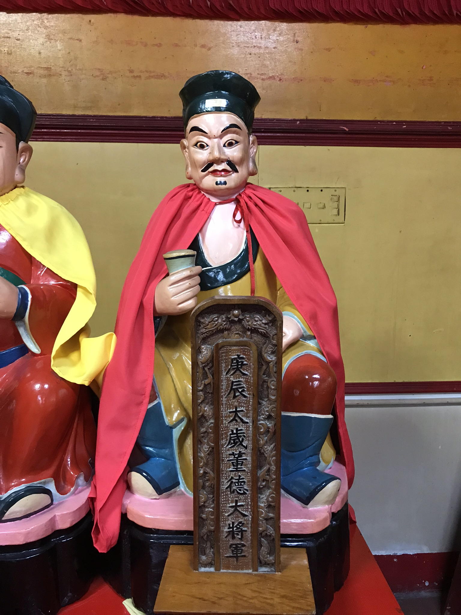 麻豆代天府庚辰太歲董德大將軍神像